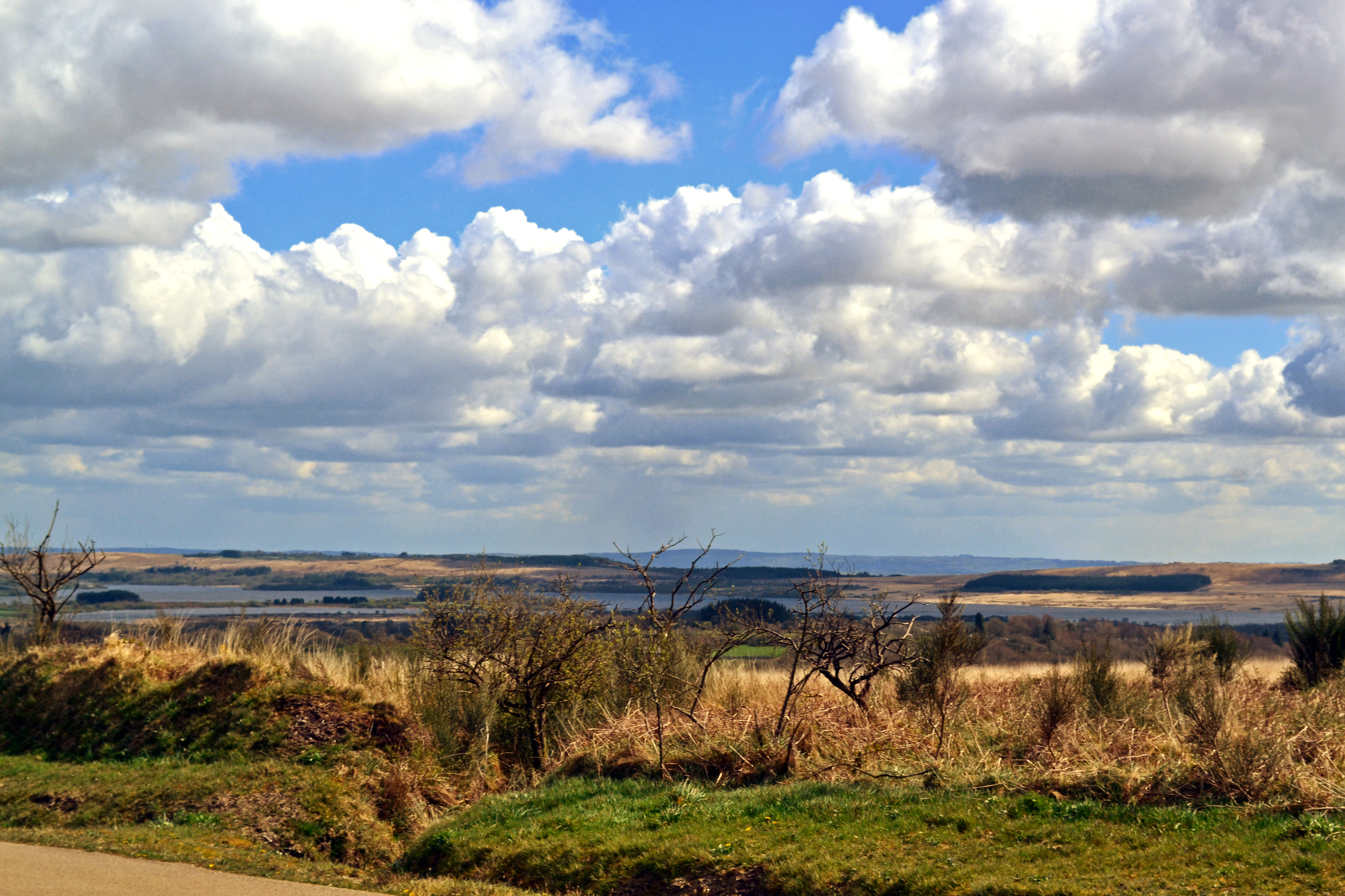 vue du marrais depuis la route qui mène au Roc'h Trédudon à Plounéour-Ménez.